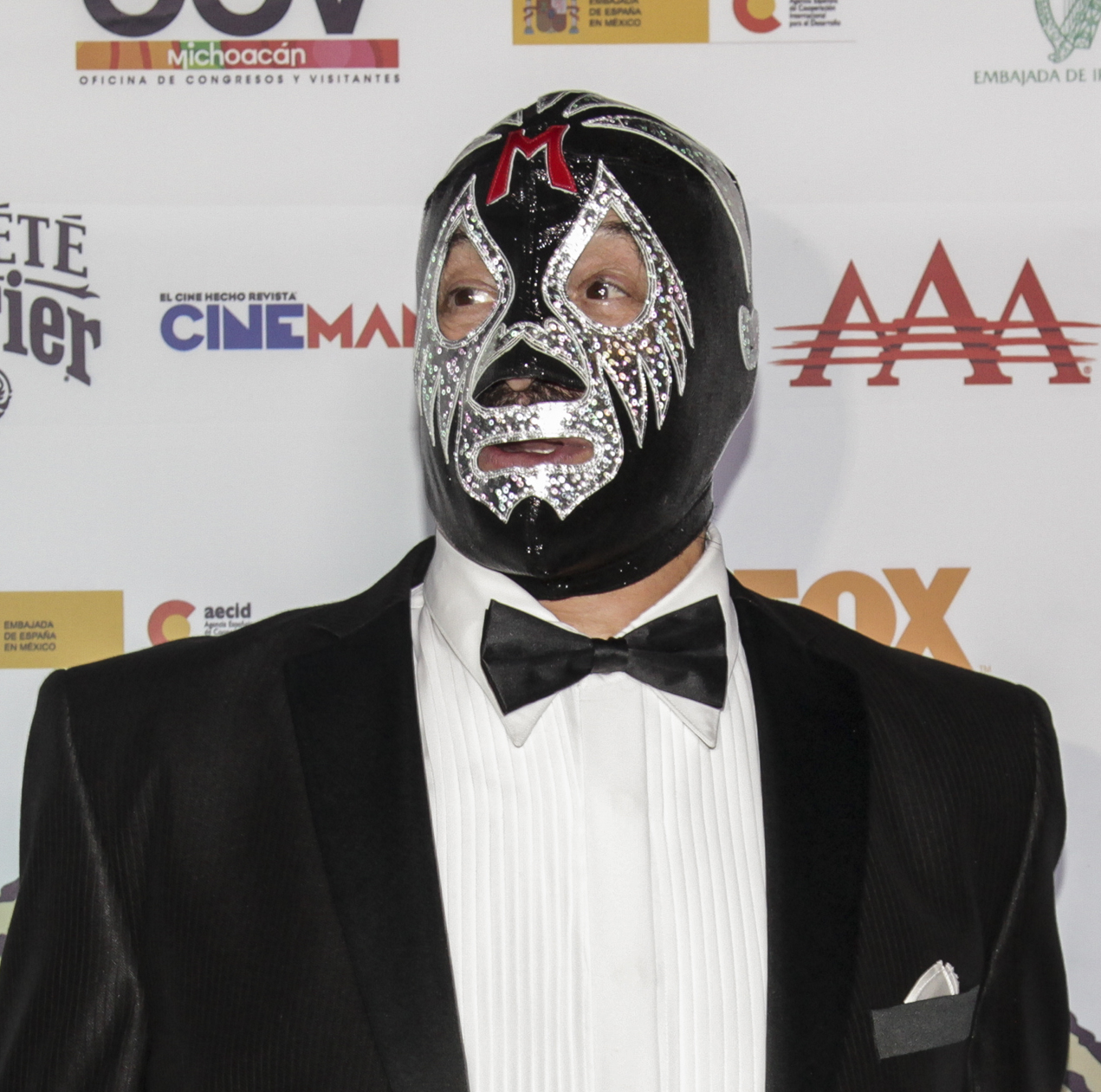 Mil Mascaras "Mr.Personalidad" en el red carpet de la inauguracion de Morbido 2012